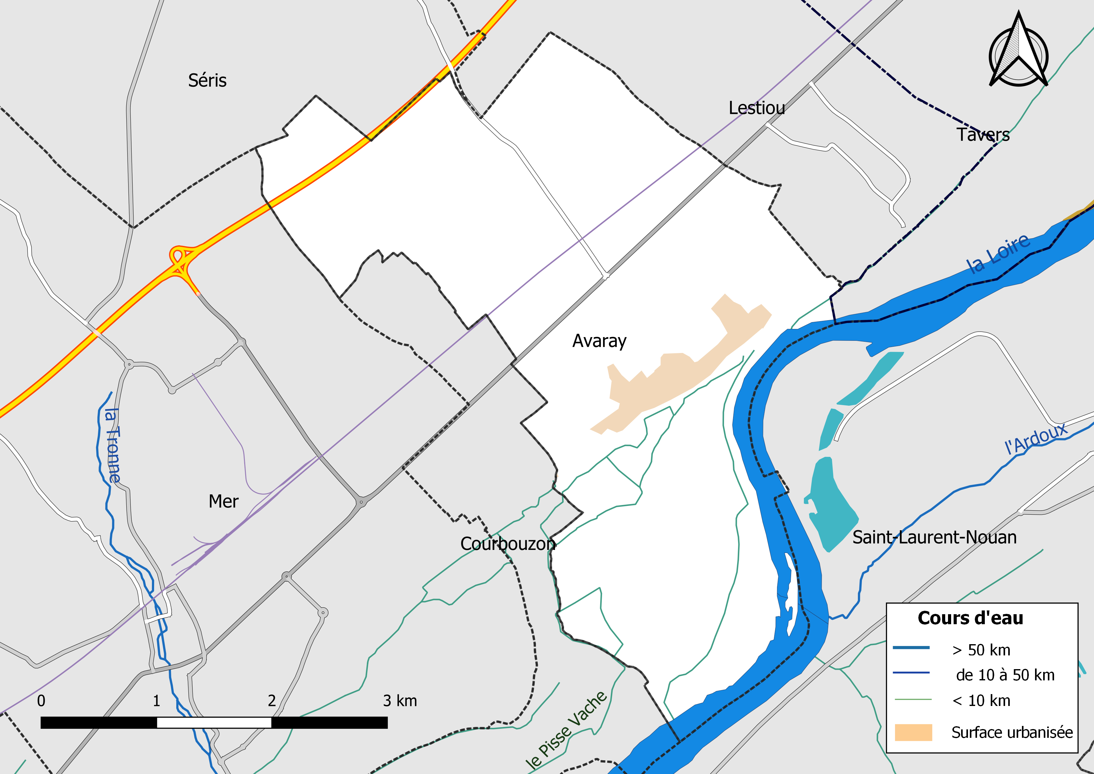 Carte du réseau hydrographique de la commune d'Avaray (France).